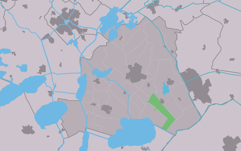 Kaartsje fan himrik fan Rotsterhaule